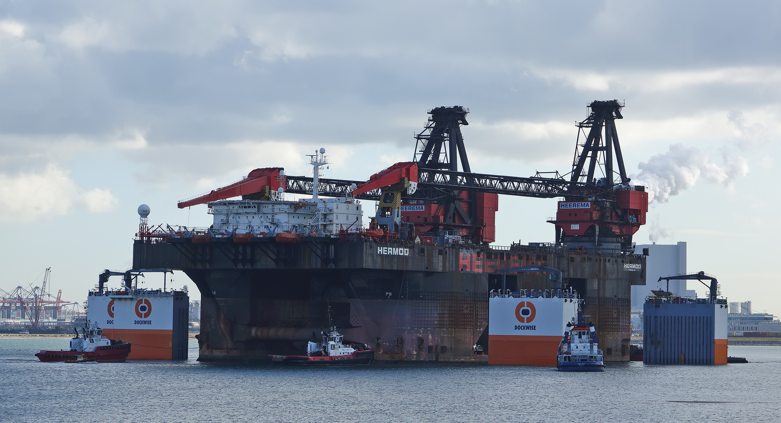 15-9-2017 verhalen HERMOD door de SMIT CHEETAH , SMIT EBRO , ROTTERDAM en ADVENTURE naar de DOCKWISE VANGUARD op de Maasvlakte 2 . Na het weekend vertrekt het transport naar Zhoushan in China Daar wordt de bijna 40-jarige 'Hermod' ontmanteld en gerecycled op de werf van Zhoushan Changhong International Ship Recycling